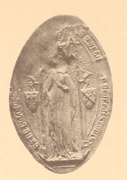 Marguerite dÉvreux